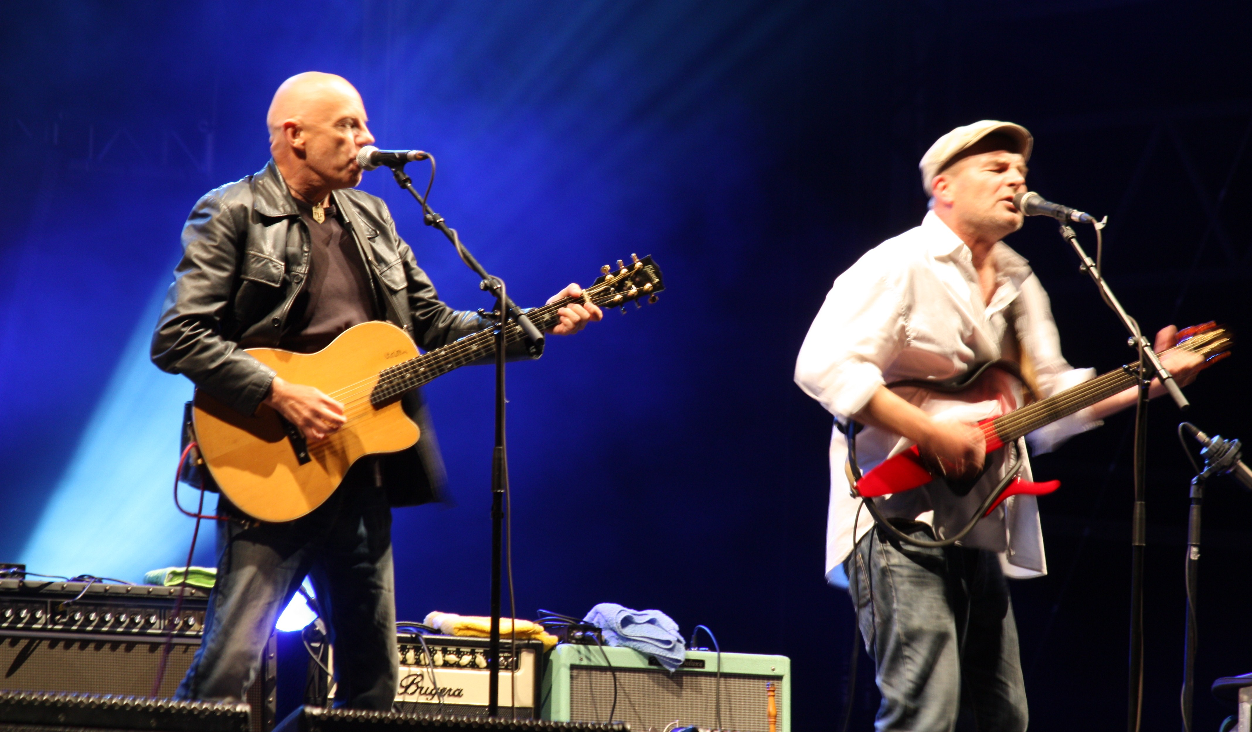 Red Cardell et leur invité, Jim O'Neill (des Silencers)